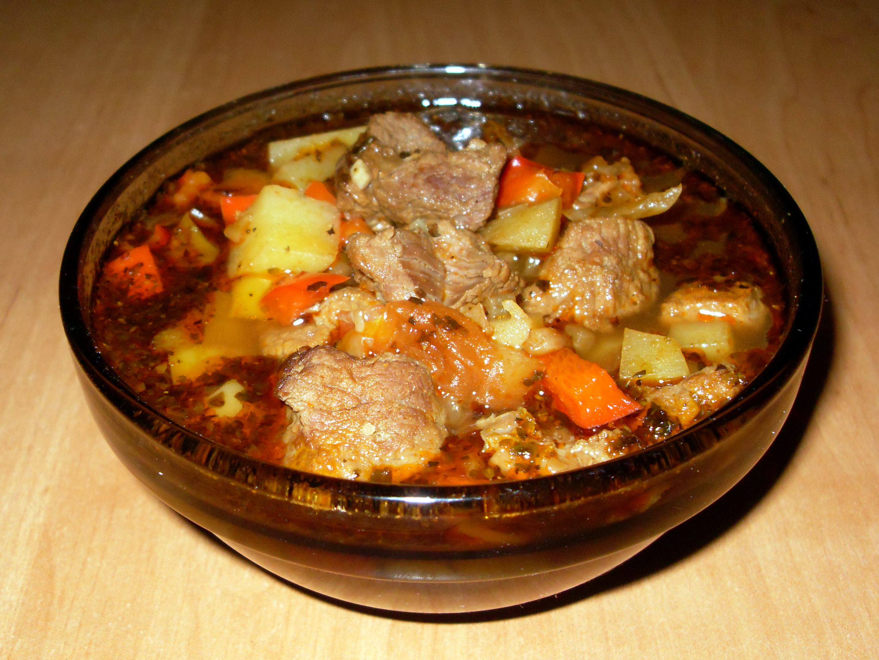 Zupa węgierska z przepisu Biedronki w wykonaniu autora zdjęcia. Widać sztandardowe składniki węgierskie: paprykę i mięso wołowe.